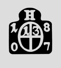 Lotový punc z roku 1807 (písmeno H - puncovní úřad Graz)